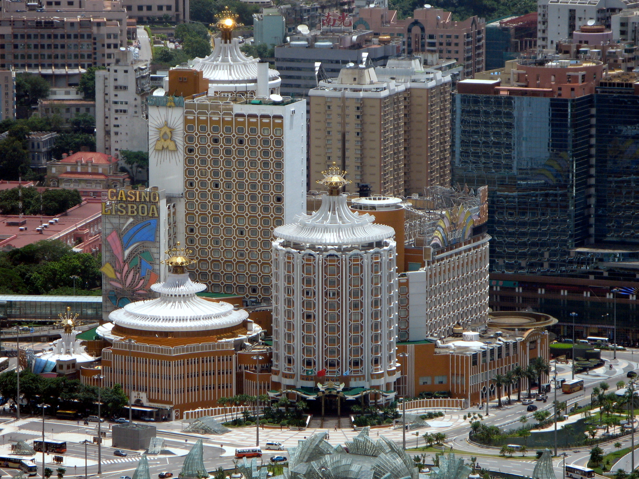 Macao Hotel Lisboa 葡京酒店